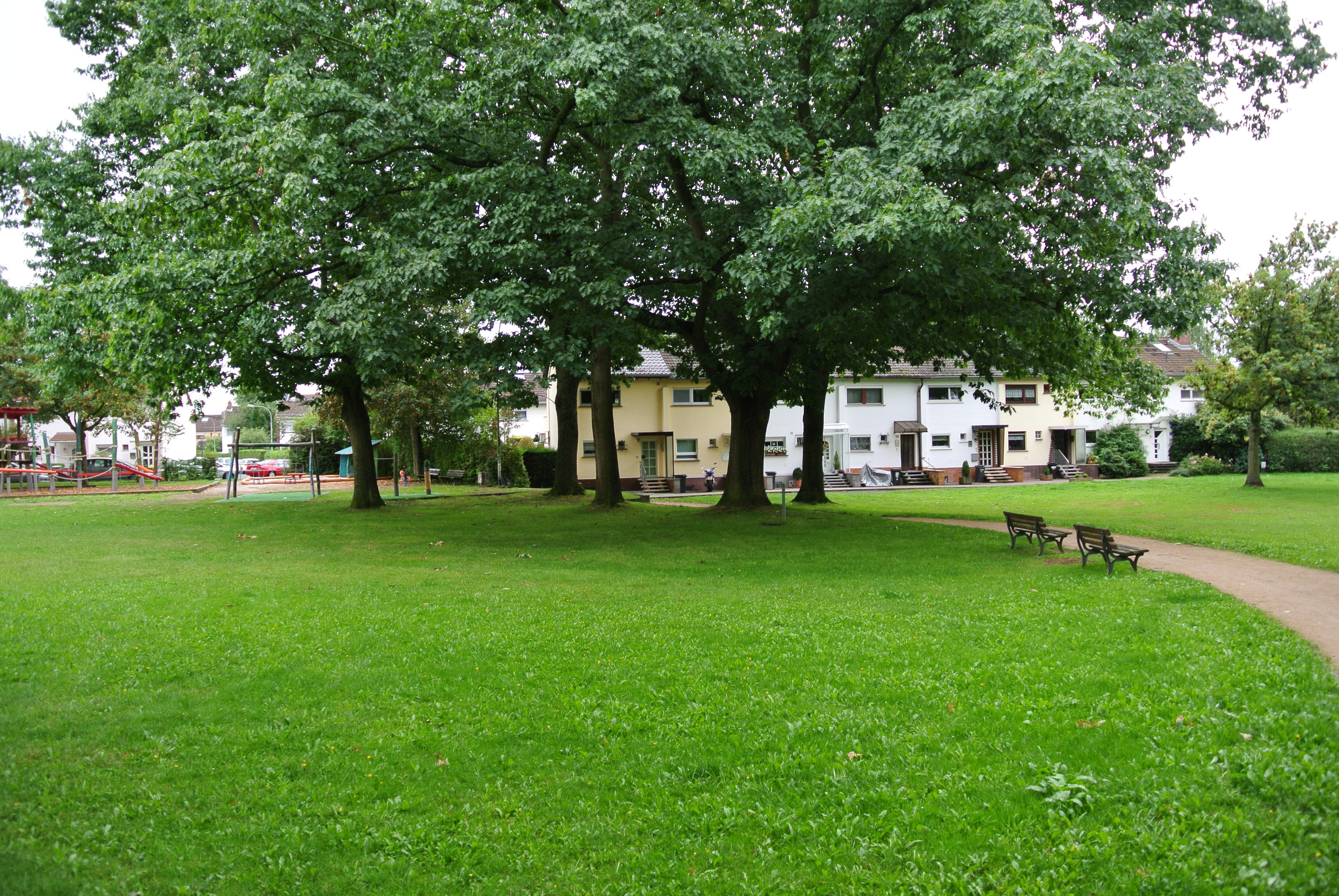 Siedlung Frankfurter Berg, Teilbereich aus den 1950er Jahren, Grünanlage am Holunderweg